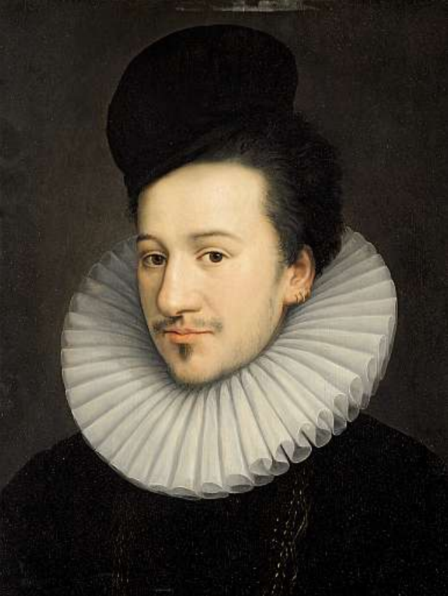 Porträt des François-Hercule de Valois, duc d’Alençon von Jean_Decourt, c. 1576